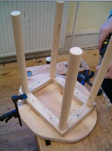 Skamlens fire ben sidder fast i sargen, som er den firkantede ramme, der er ved at blive skruet fast til skamlens sæde. Billede fra sløjdsal på en skole i 2006.